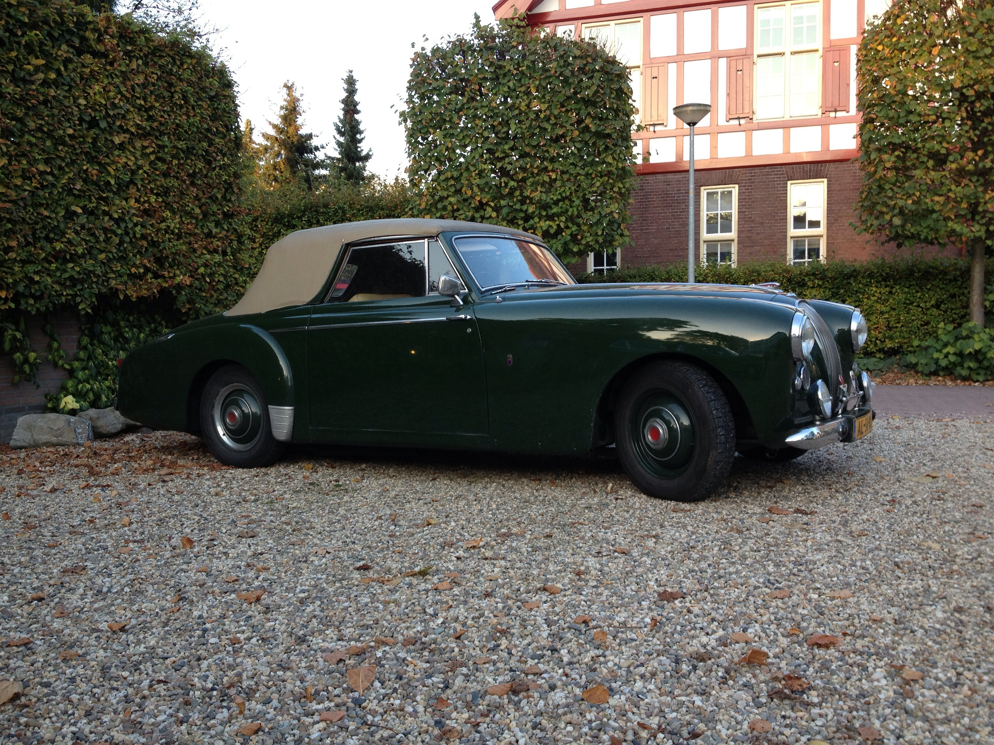 Lagonda 3-litre drophead coupé Rare 3-Litre Drophead Coupé.